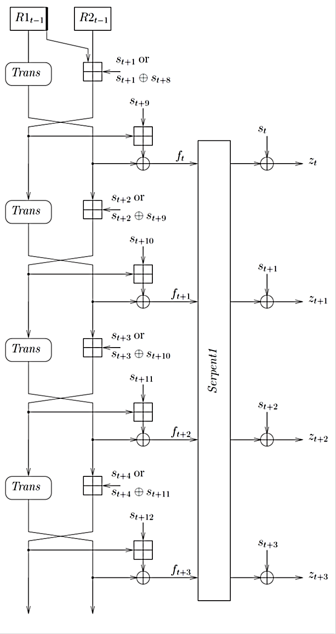 Схема выходного преобразования для шифра Sosemanuk.